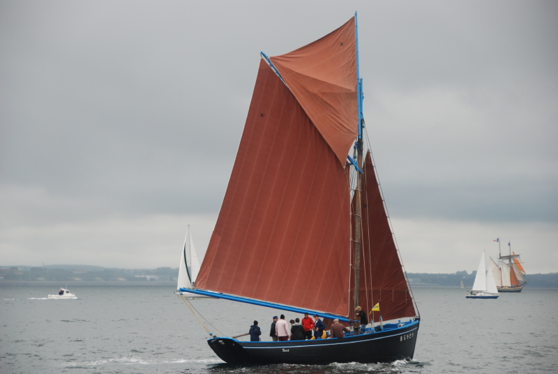 Le cotre aurique Bergère de Domrémy - Brest 2008